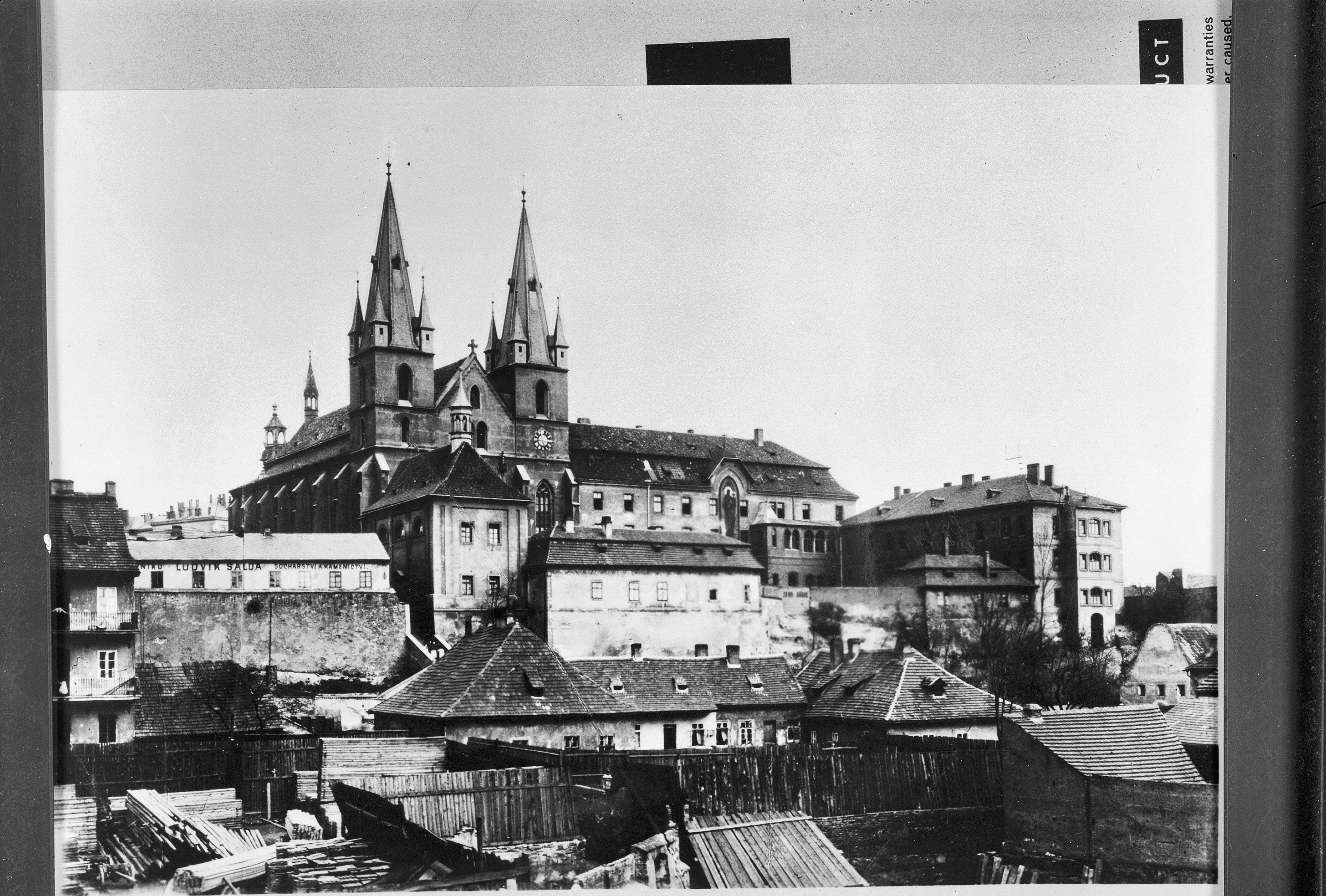 Emmauskerk: Emmauskerk, overzicht, reproductie van foto